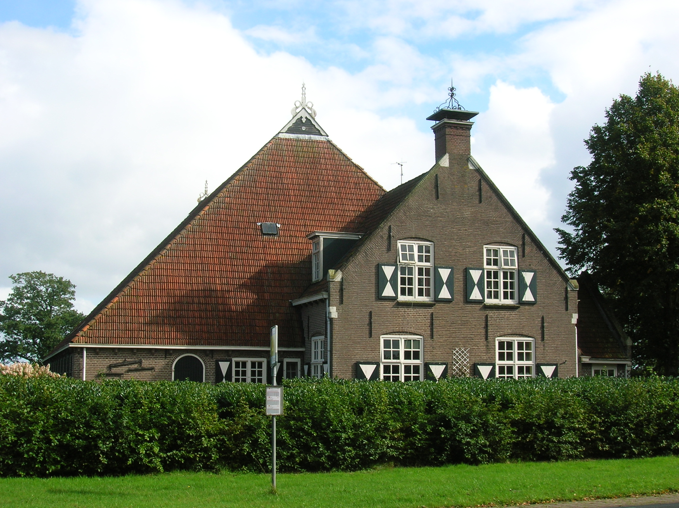 Kop-romp boerderij in gebruik als Biologisch Melkveebedrijf